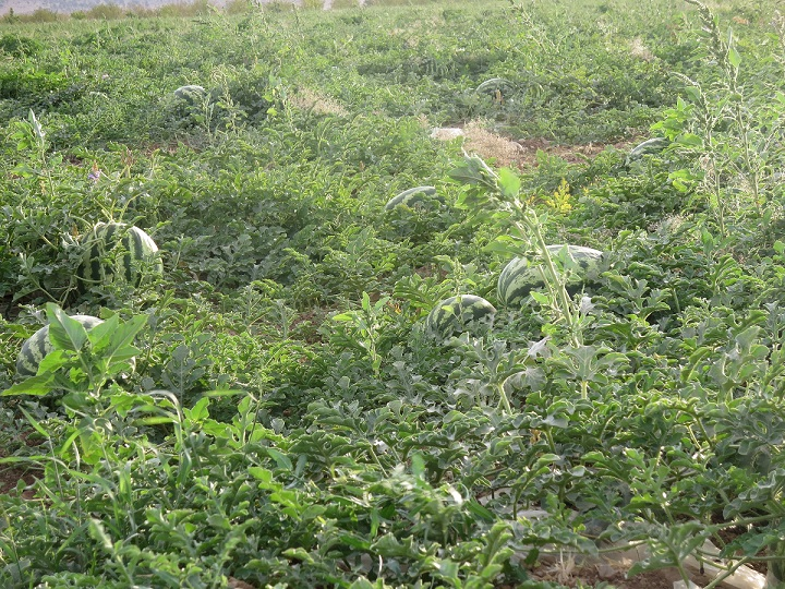 کاشت هندوانه در سرپنیران